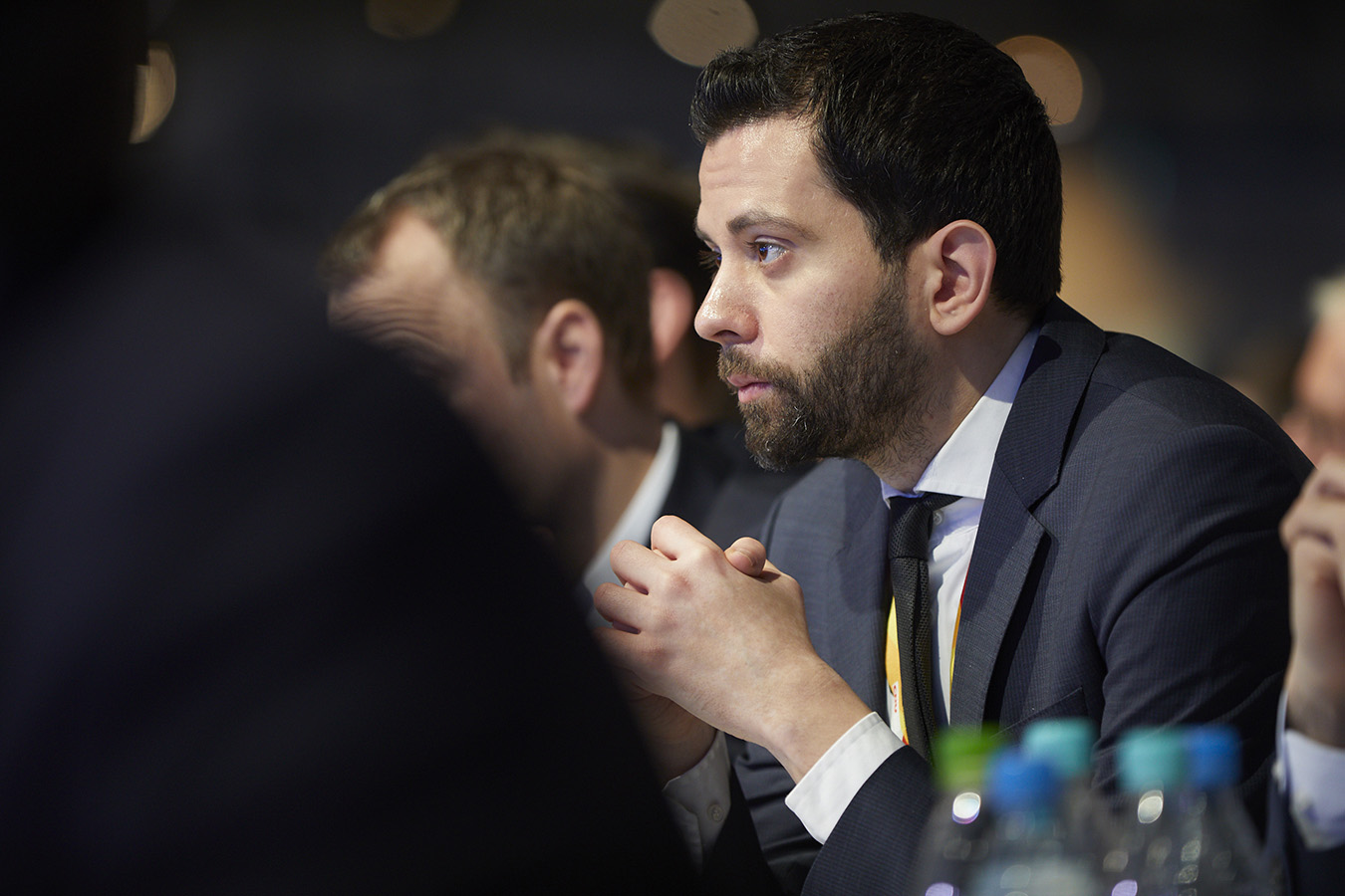 Martin Pätzold beim Bundesparteitag der CDU Deutschland am 26.02.18